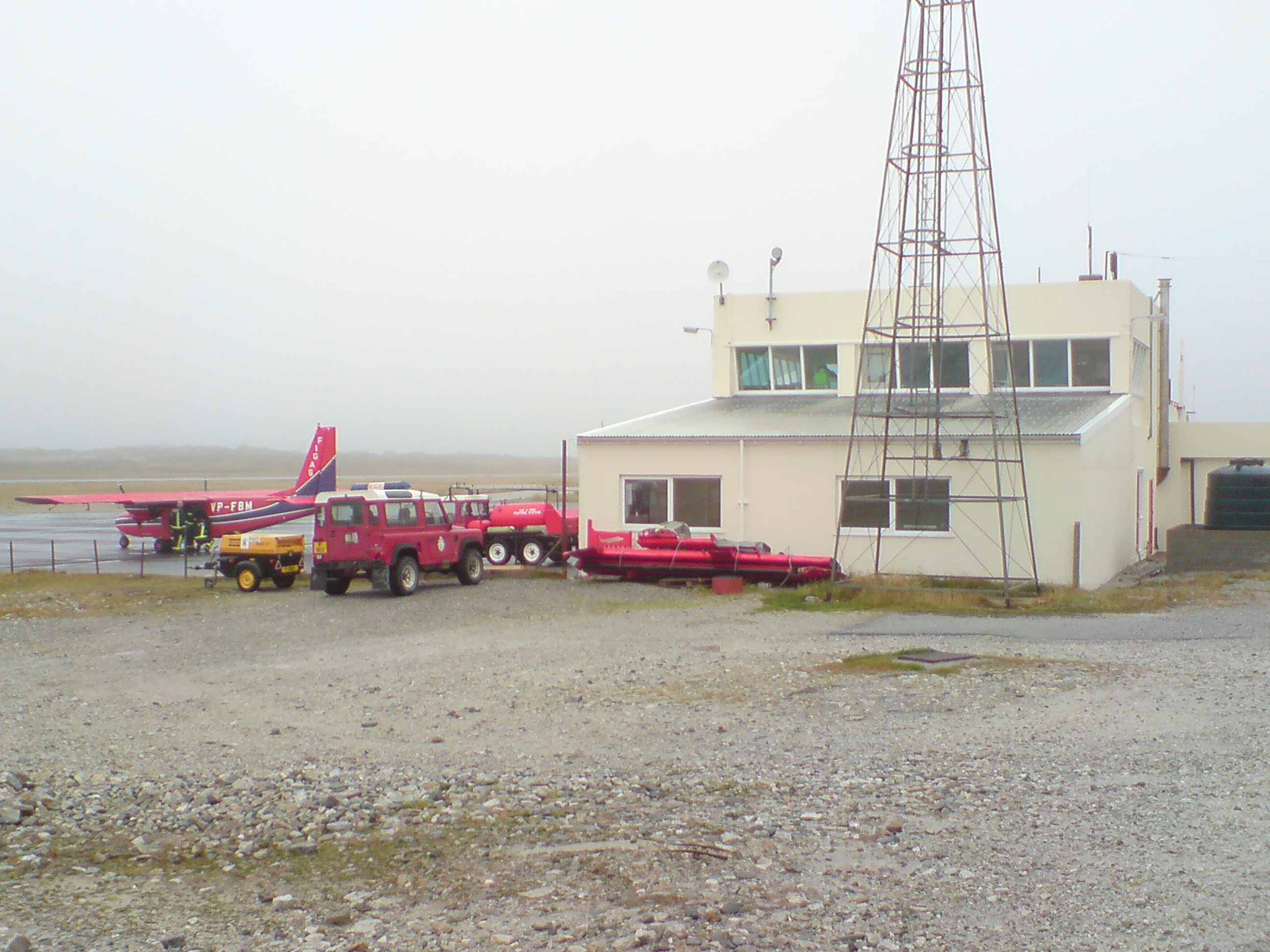 Terminalbyggnaden. Stanleys flygplats